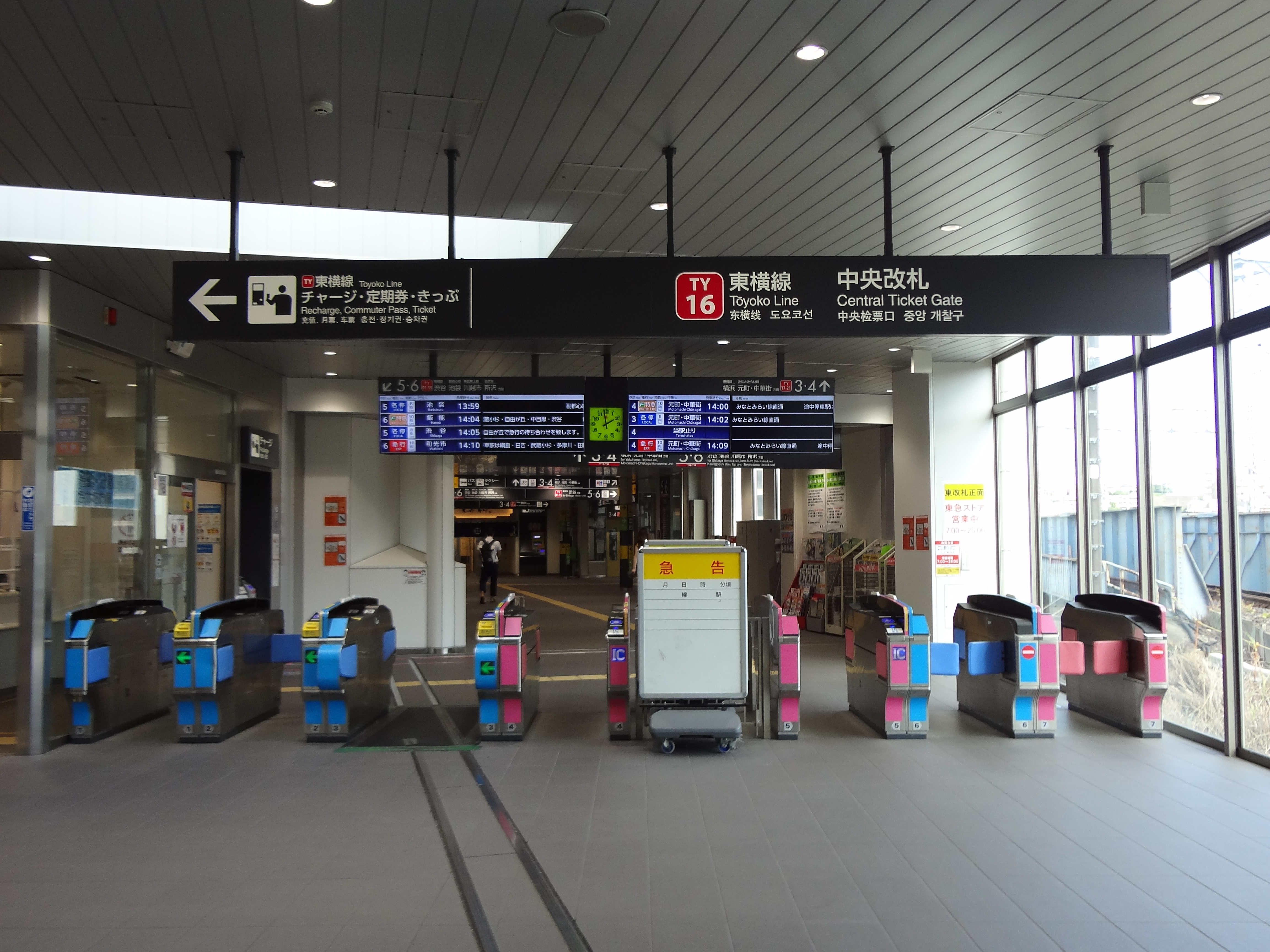 菊名駅中央改札口